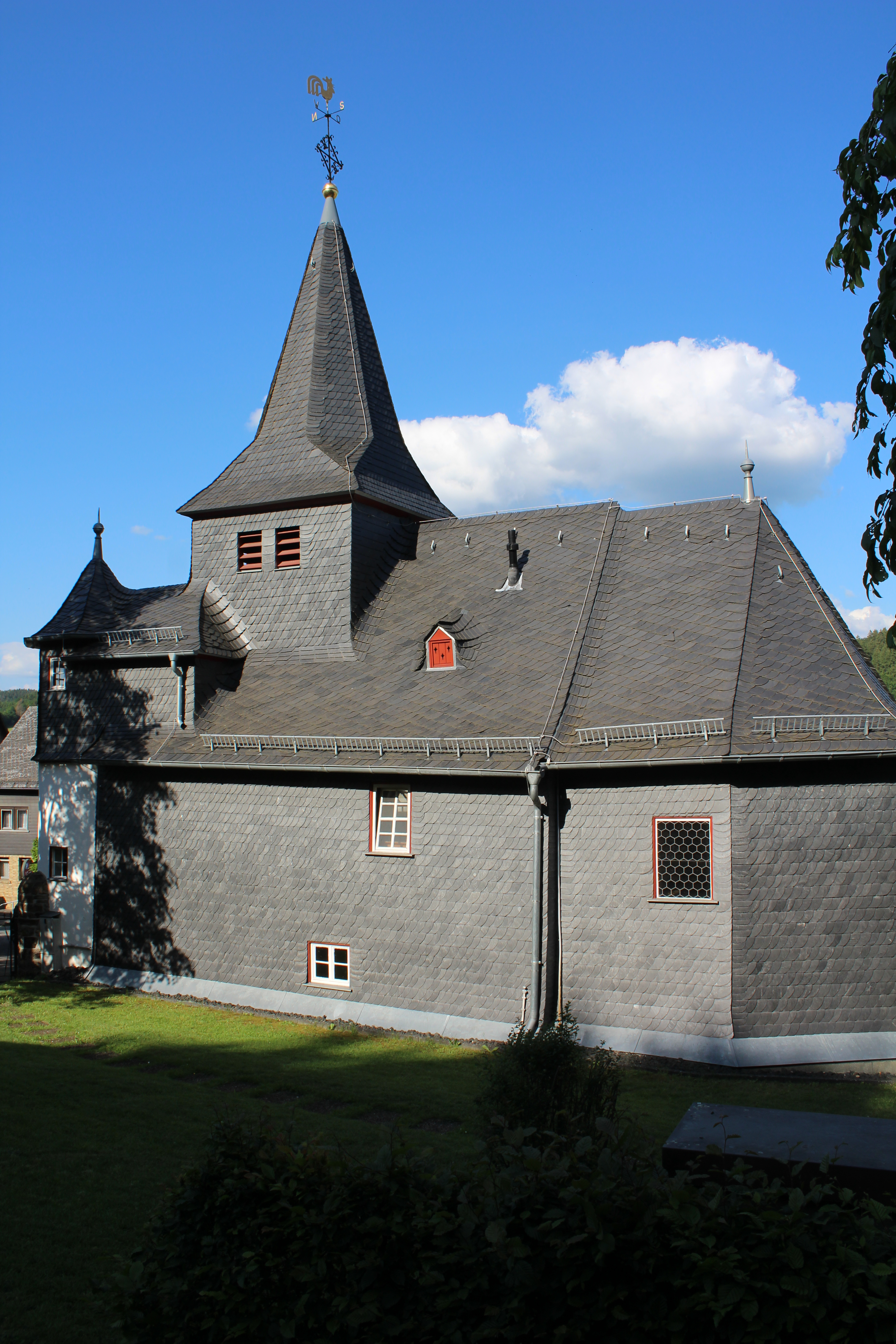 Ev. Kapelle Steinbrücken, Gemeinde Dietzhölztal, Hessen, Deutschland